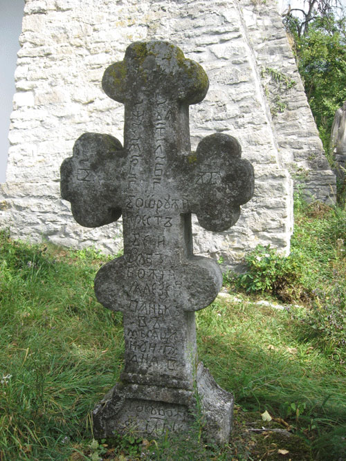 Чесники